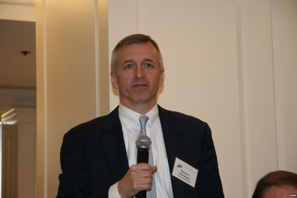 前美國國務院亞太副助理國務卿柯慶生（Thomas J. Christensen），現任普林斯頓大學政治學教授。